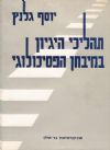 תהליכי היגיון במבחן הפסיכולוגי